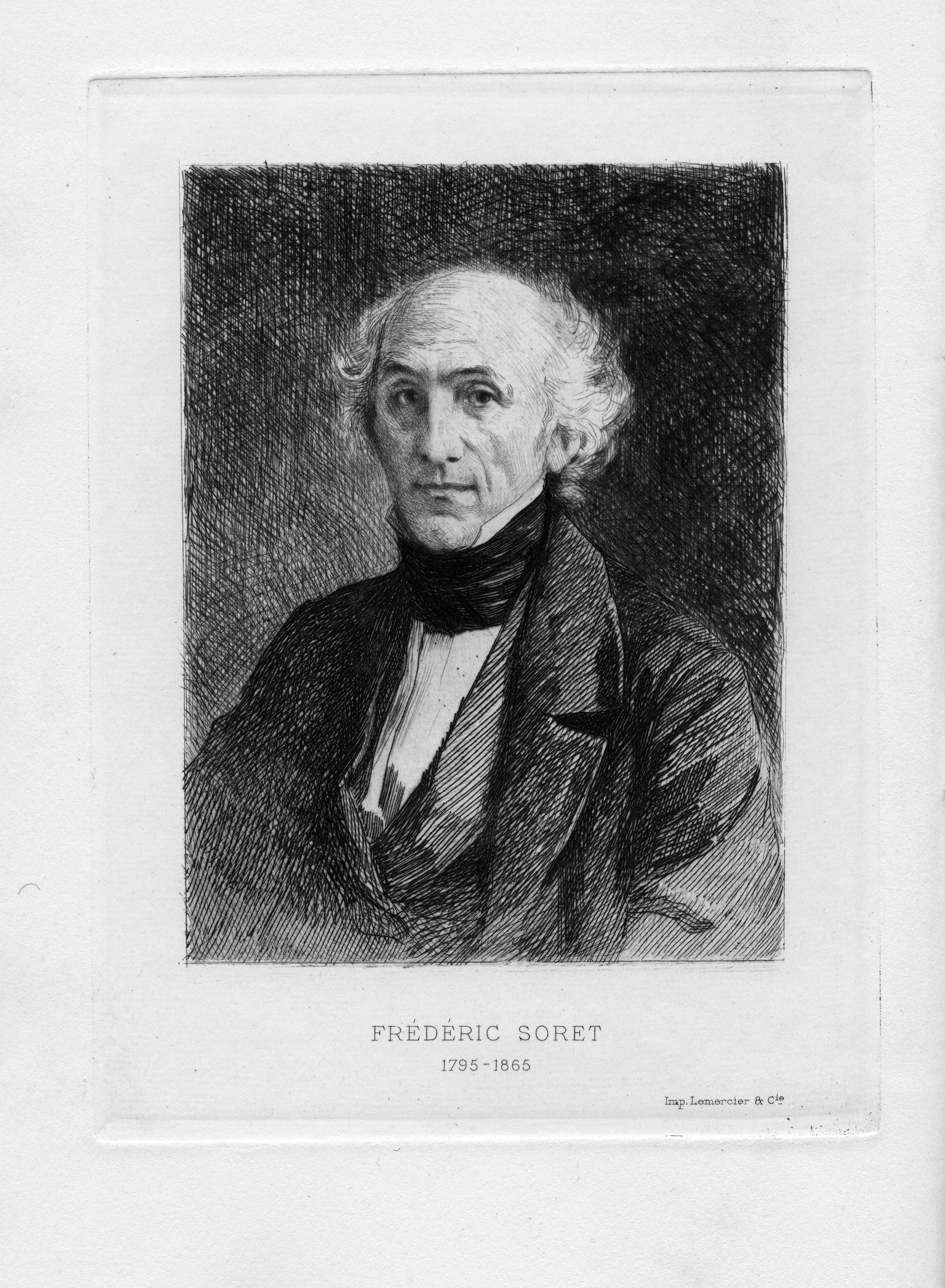 portrait gravé